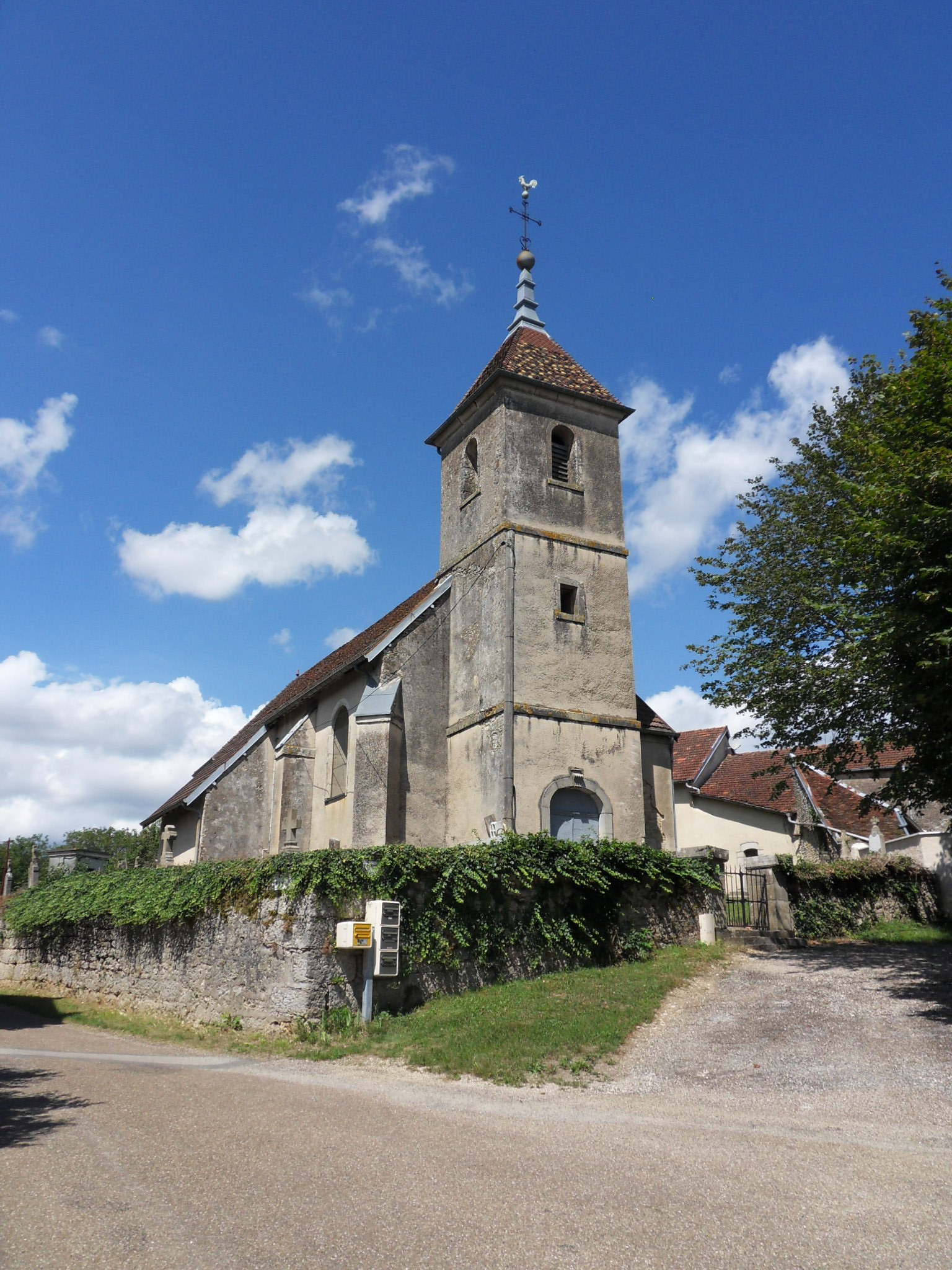 L'église de Lieucourt, Franche-Comté France.